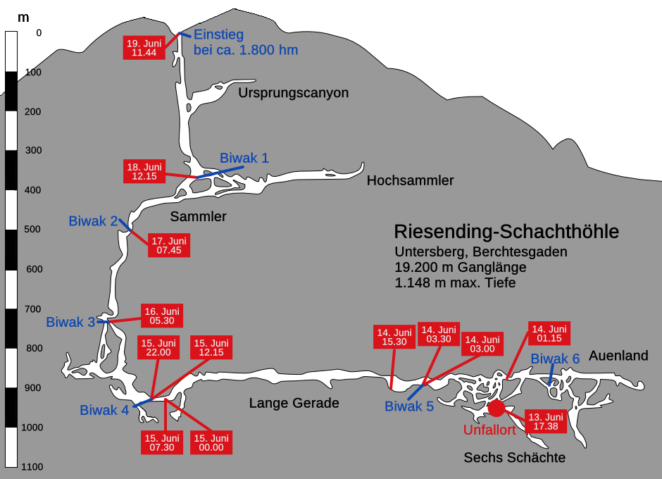 Rettungsaktions in der Riesending-Schachthöhle Juni 2014